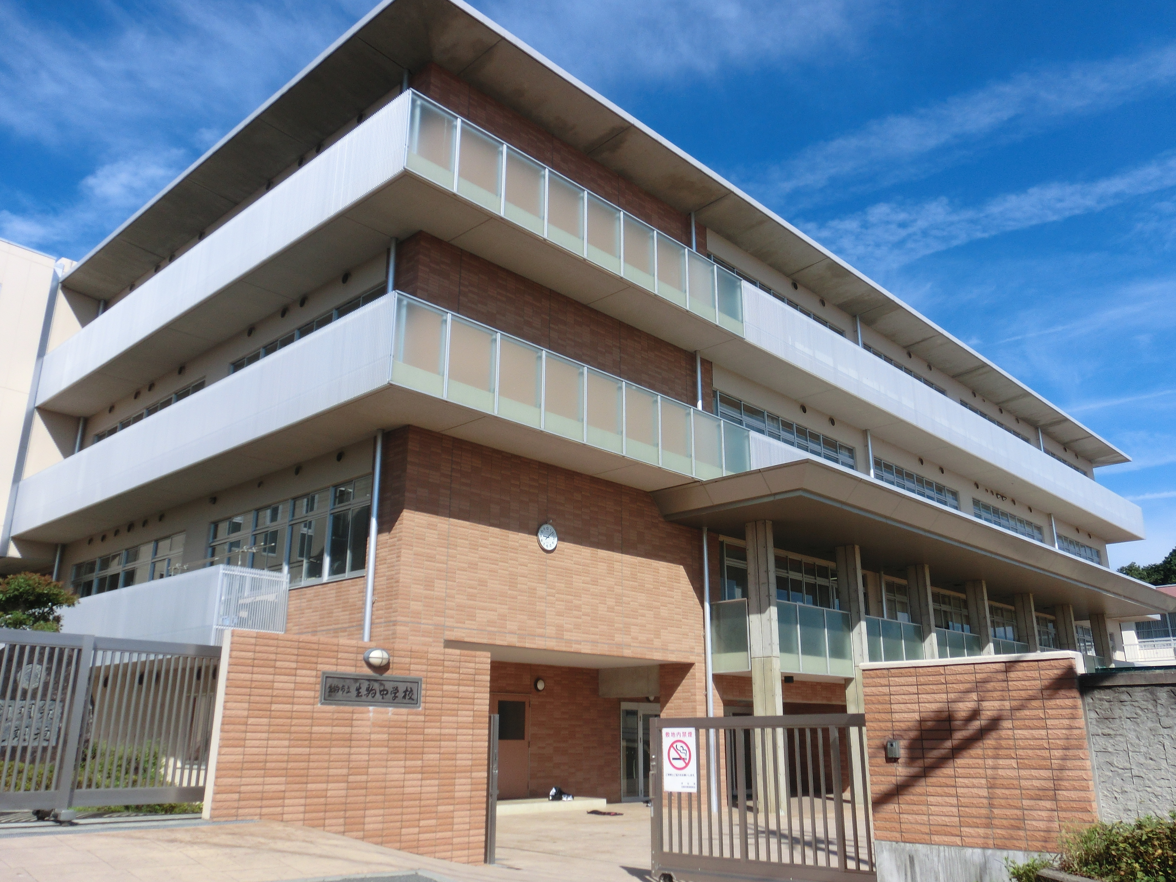 生駒中学校校門より本館を望む